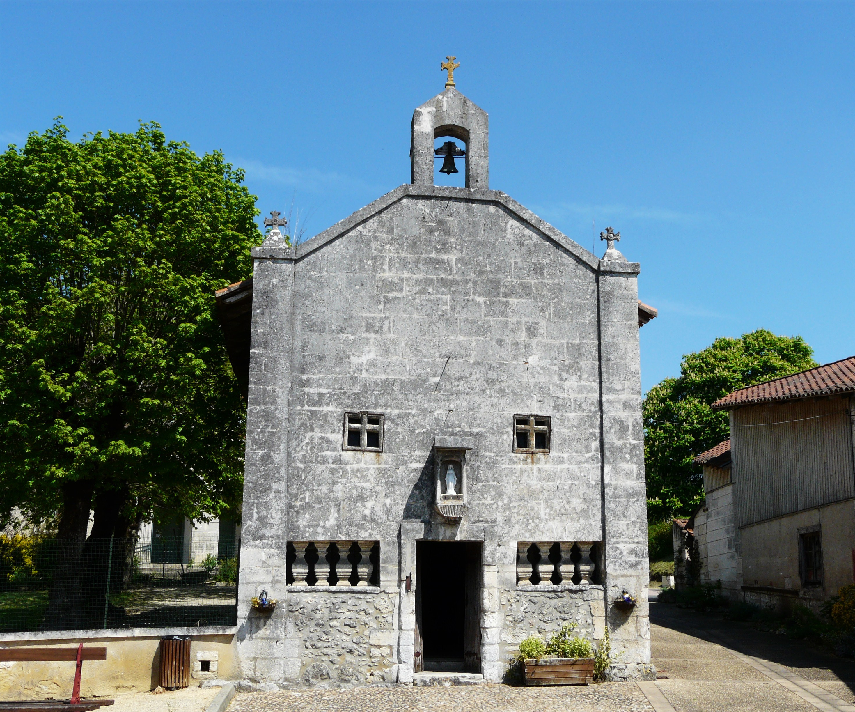 La chapelle Notre-Dame de Bon secours, Champagnac-de-Belair, Dordogne, France